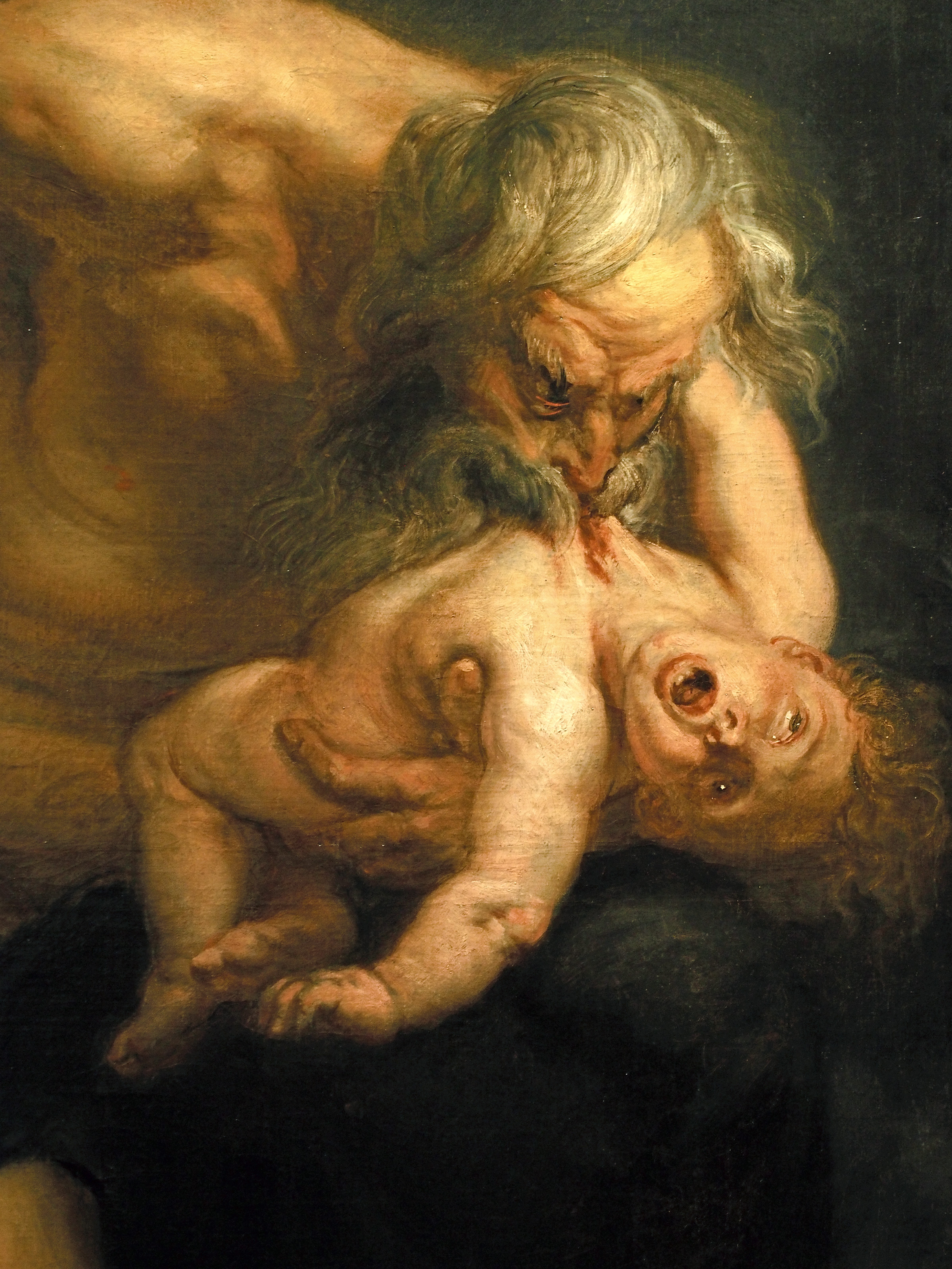 Peter-Paul Rubens. Saturno devorando a uno de sus hijos (detalle).